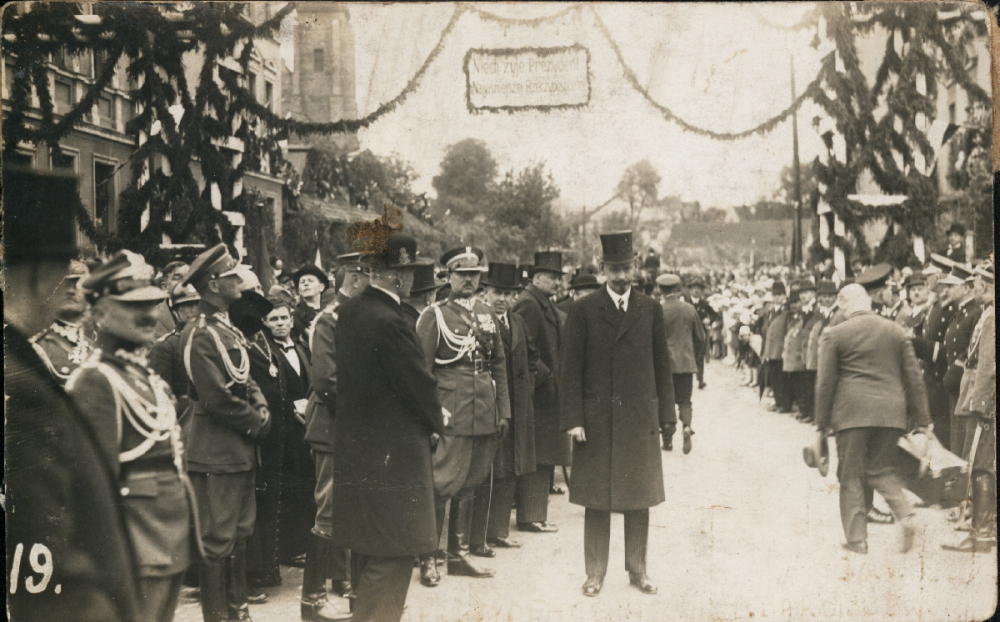 Gniezno, 20 maja 1929 r. Ulica Poznańska. Prezydent miasta Leon Barciszewski czeka na przybycie głowy państwa.